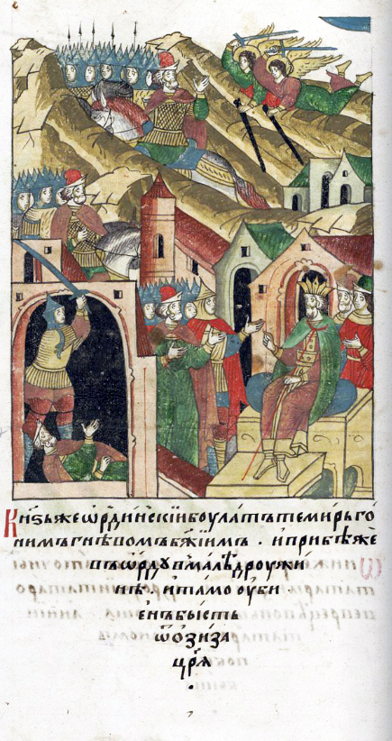 ЛИЦЕВОЙ ЛЕТОПИСНЫЙ СВОД Князь же Ордынский Булат-Темир, гонимый гневом Божьим, вернулся в Орду с небольшой дружиной и был убит там царем Озизом.